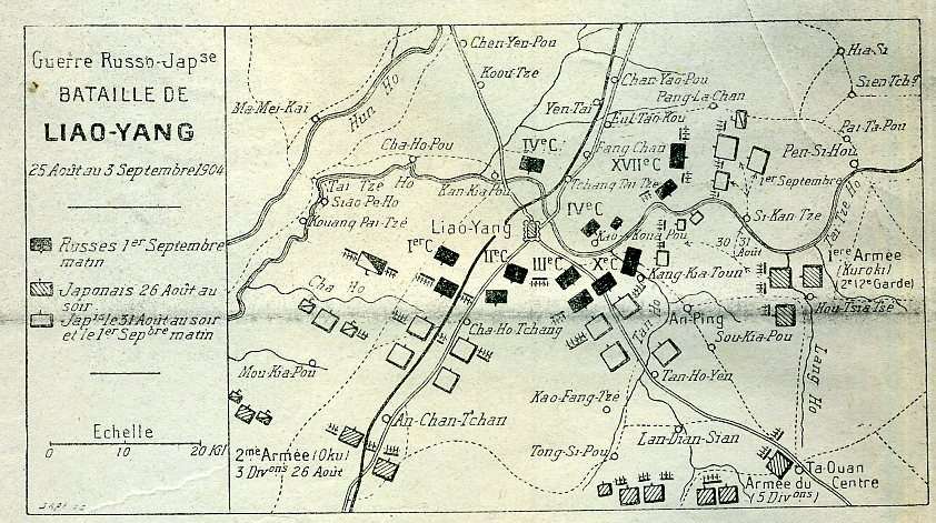 see picture